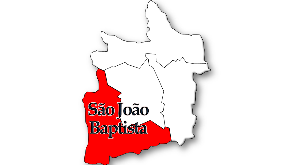 Evolução da População